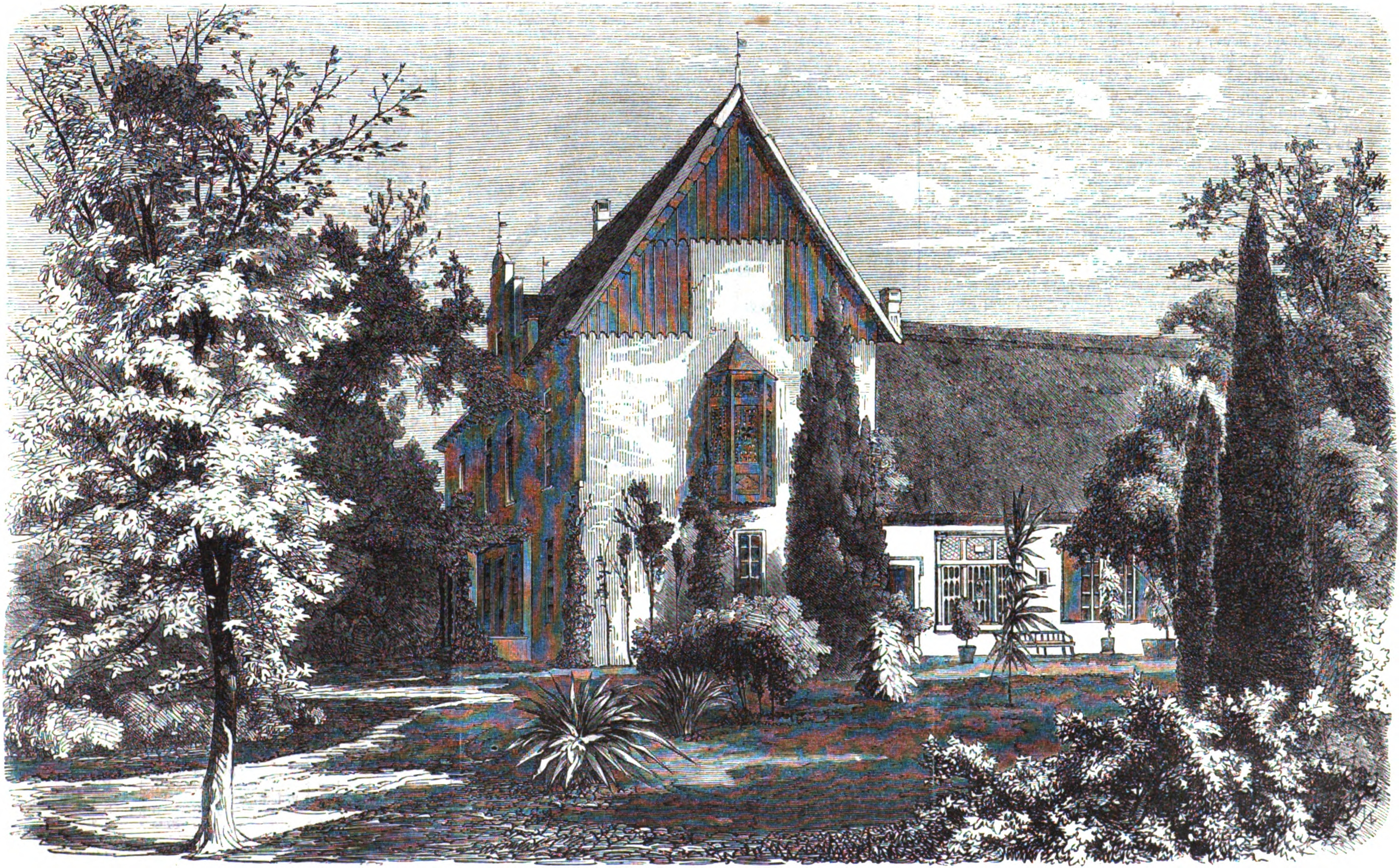 Haus des deutschen Dichters Hermann Allmers in Rechtenfleth, 1866.